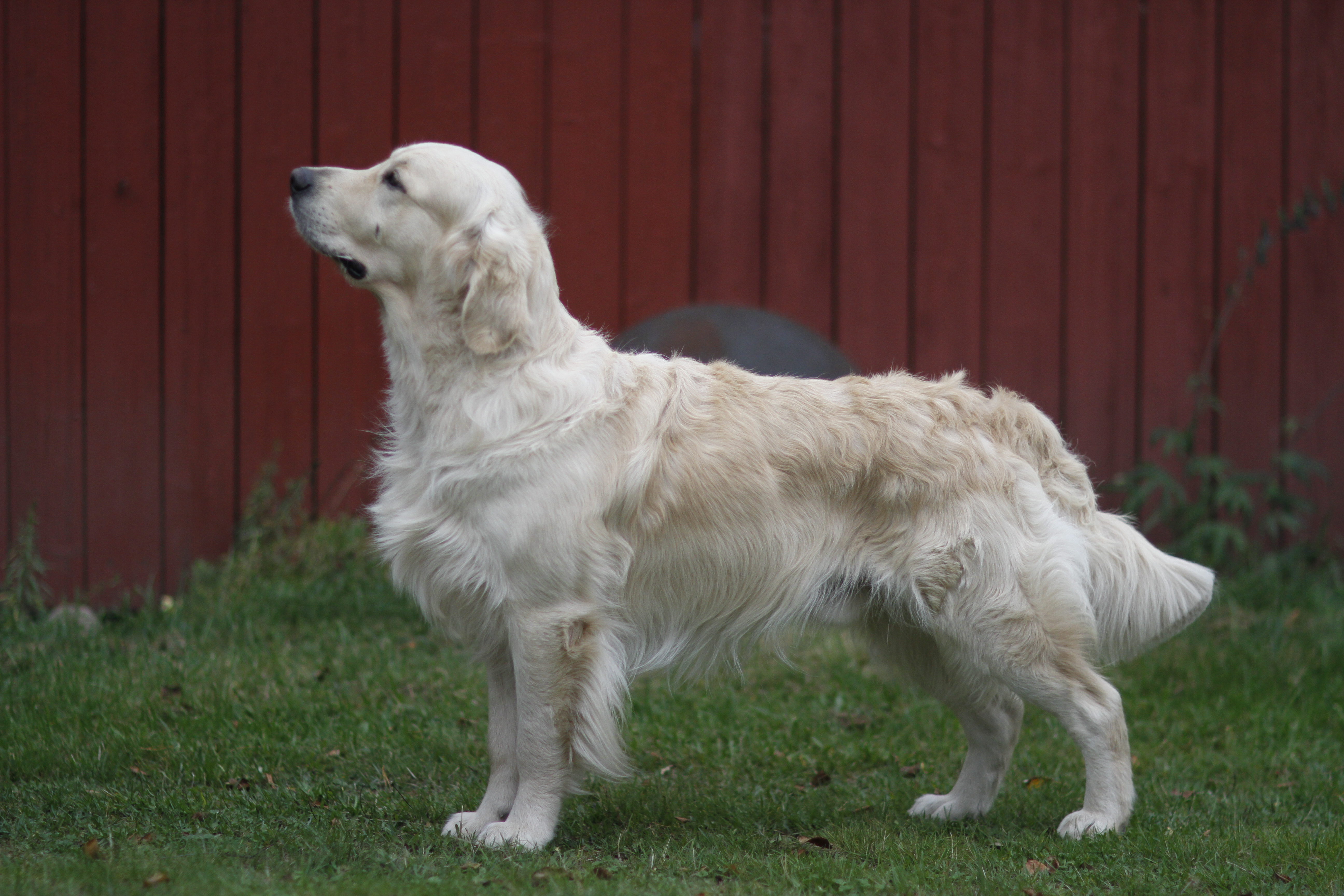 Rasebeskrivelse